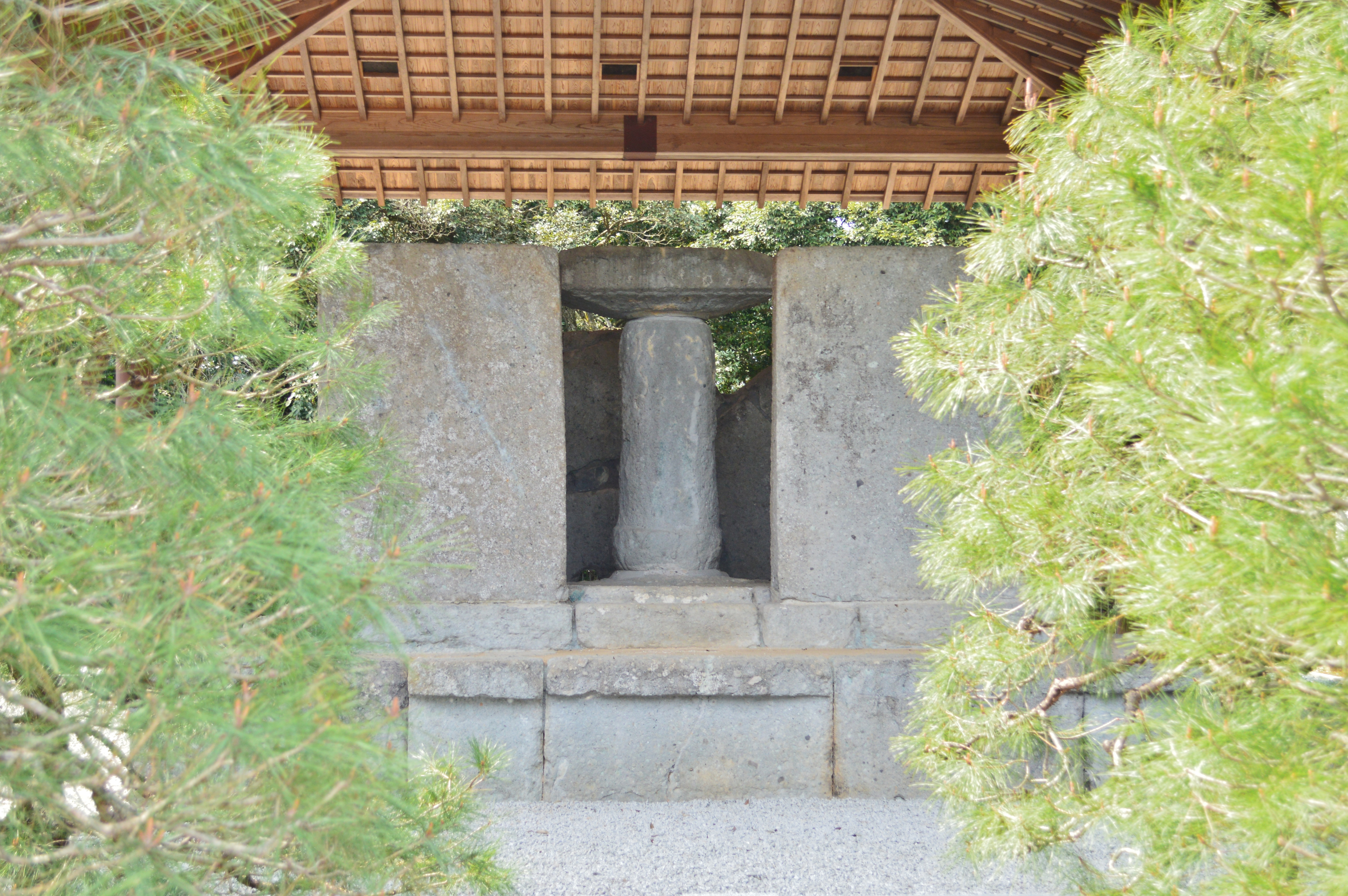 岡益の石堂 正面 Nikon D3200